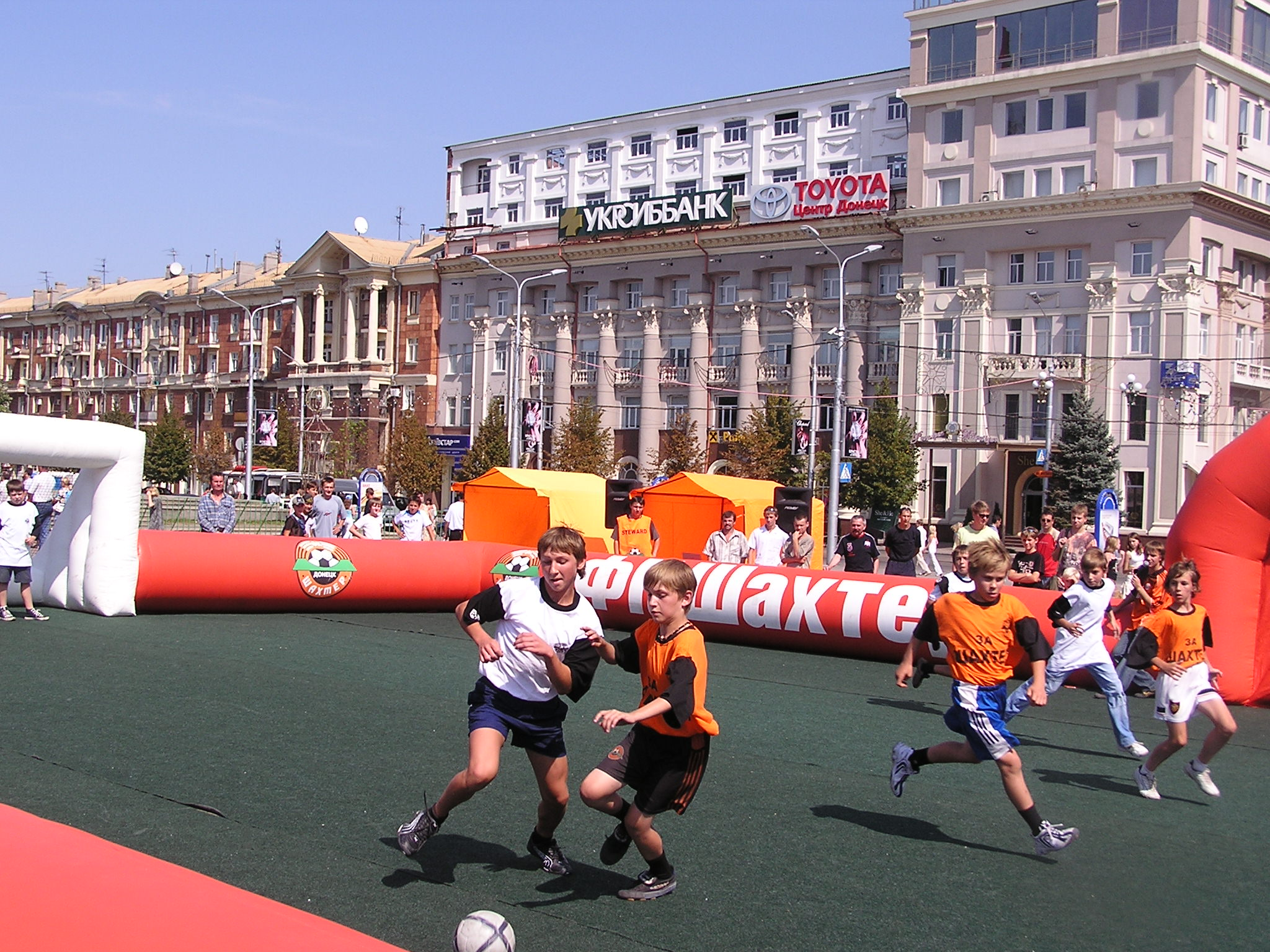 Donetsk football